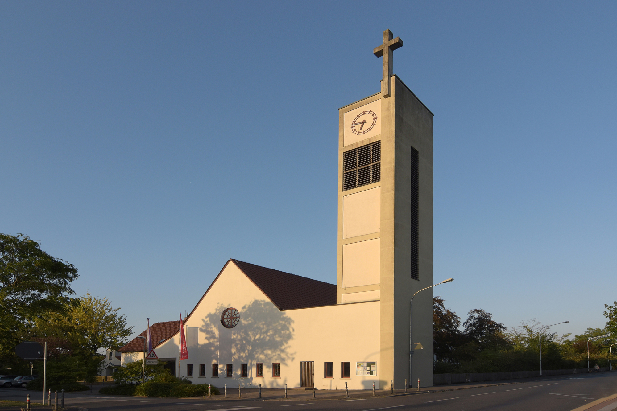 Denkmalgeschützte Kirche der evangelischen Matthäusgemeinde, Darmstadt-Heimstädtensiedlung, Heimstättenstraße 77